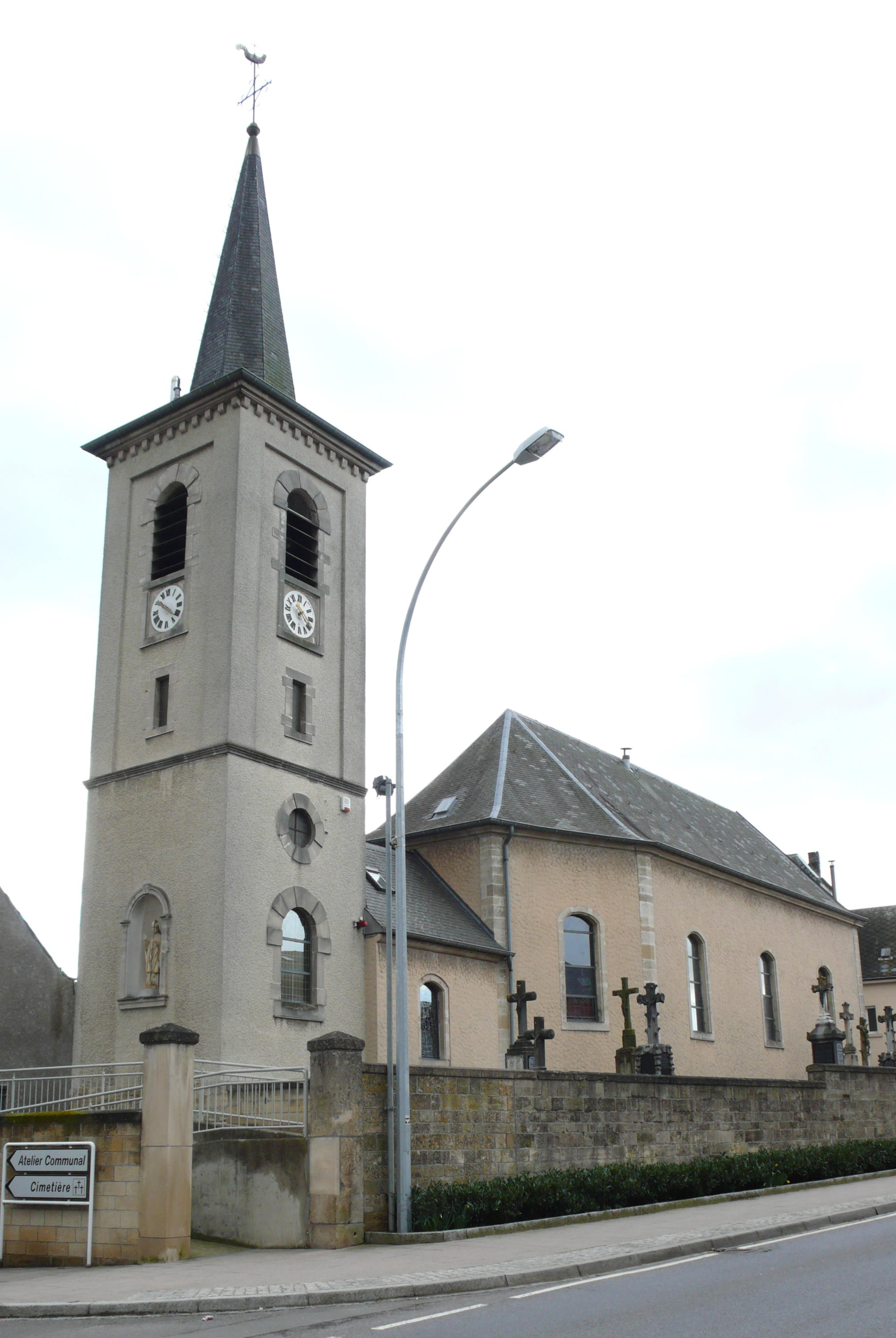 Kierch Helleng.